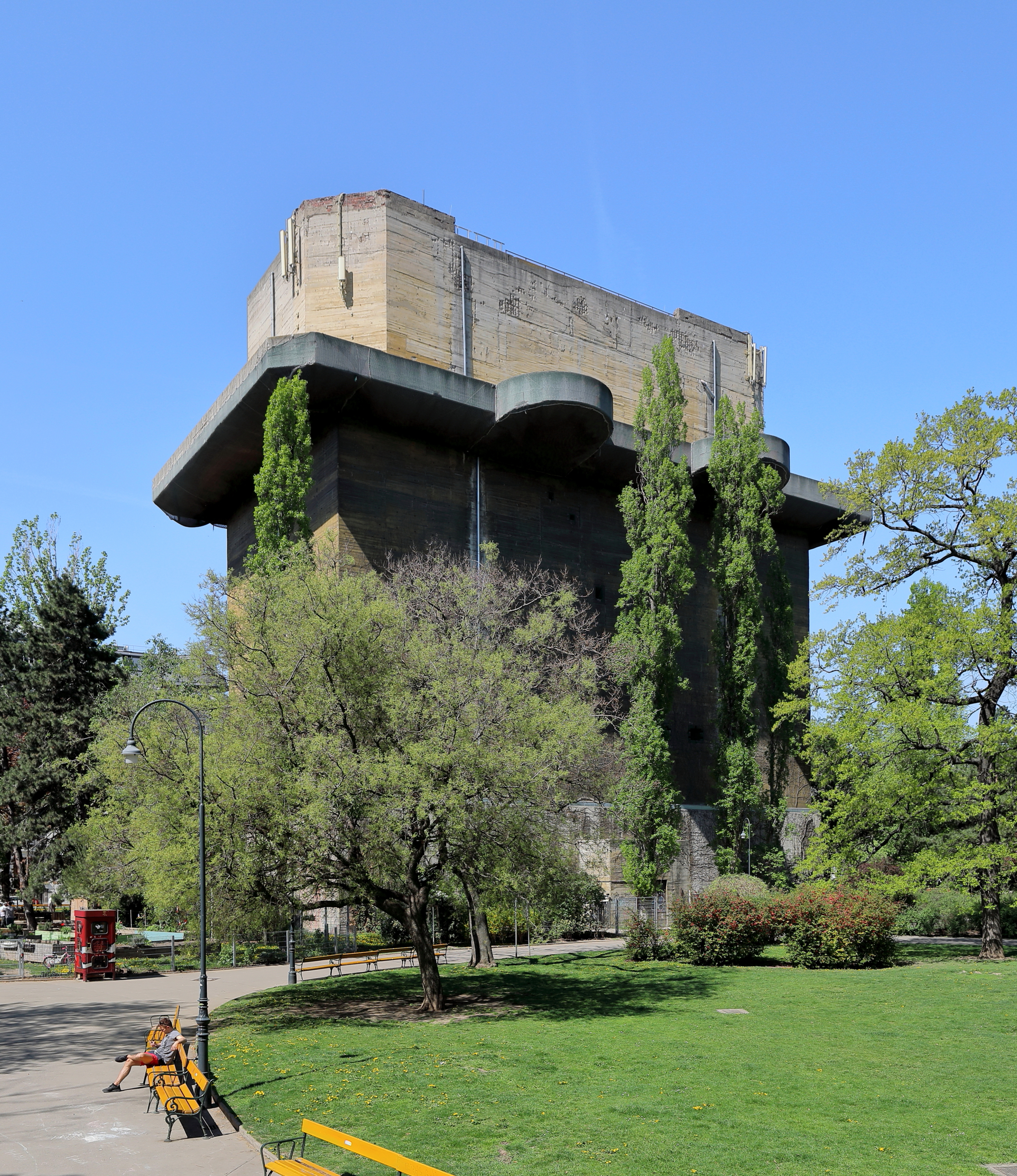 Der Flak-Leitturm im Arenbergpark des 3. Wiener Gemeindebezirkes Landstraße. Die Wiener Flaktürme wurden von 1942 bis 1944 nach Plänen des Architekten Friedrich Tamms errichtet. Weitere Flakturmpaare (Geschützturm und Leitturm) gibt es in Wien im Augarten und in der Stiftskaserne (Geschützturm) / Esterházypark (Leitturm).